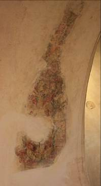 Restos de pintura mural en el interior del monumento